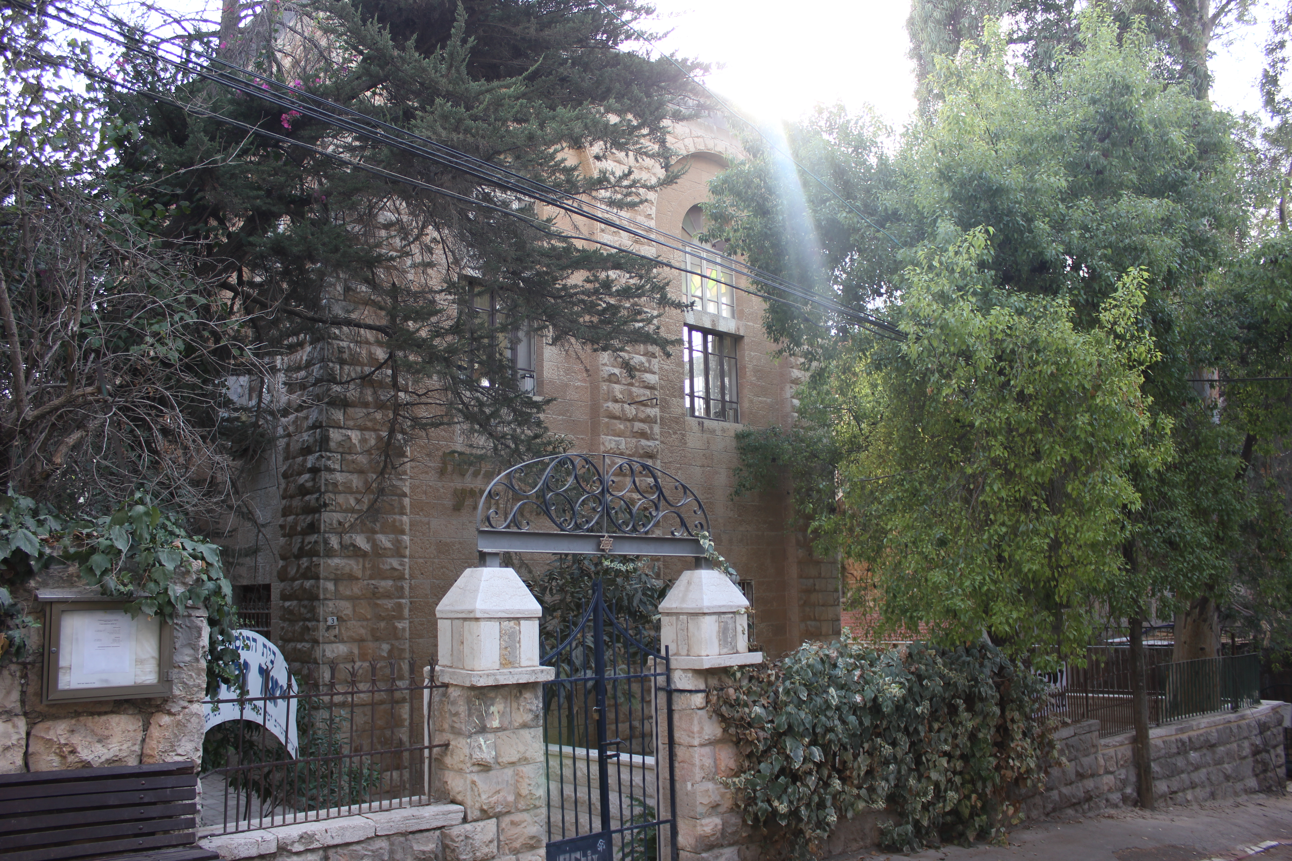 בית הכנסת אור זרוע הוא בית כנסת ברח' רפאלי בירושלים. הוקם ביוזמת הרב עמרם אבורביע לעדת המערבים, וכלל גם בית מדרש בראשותו.